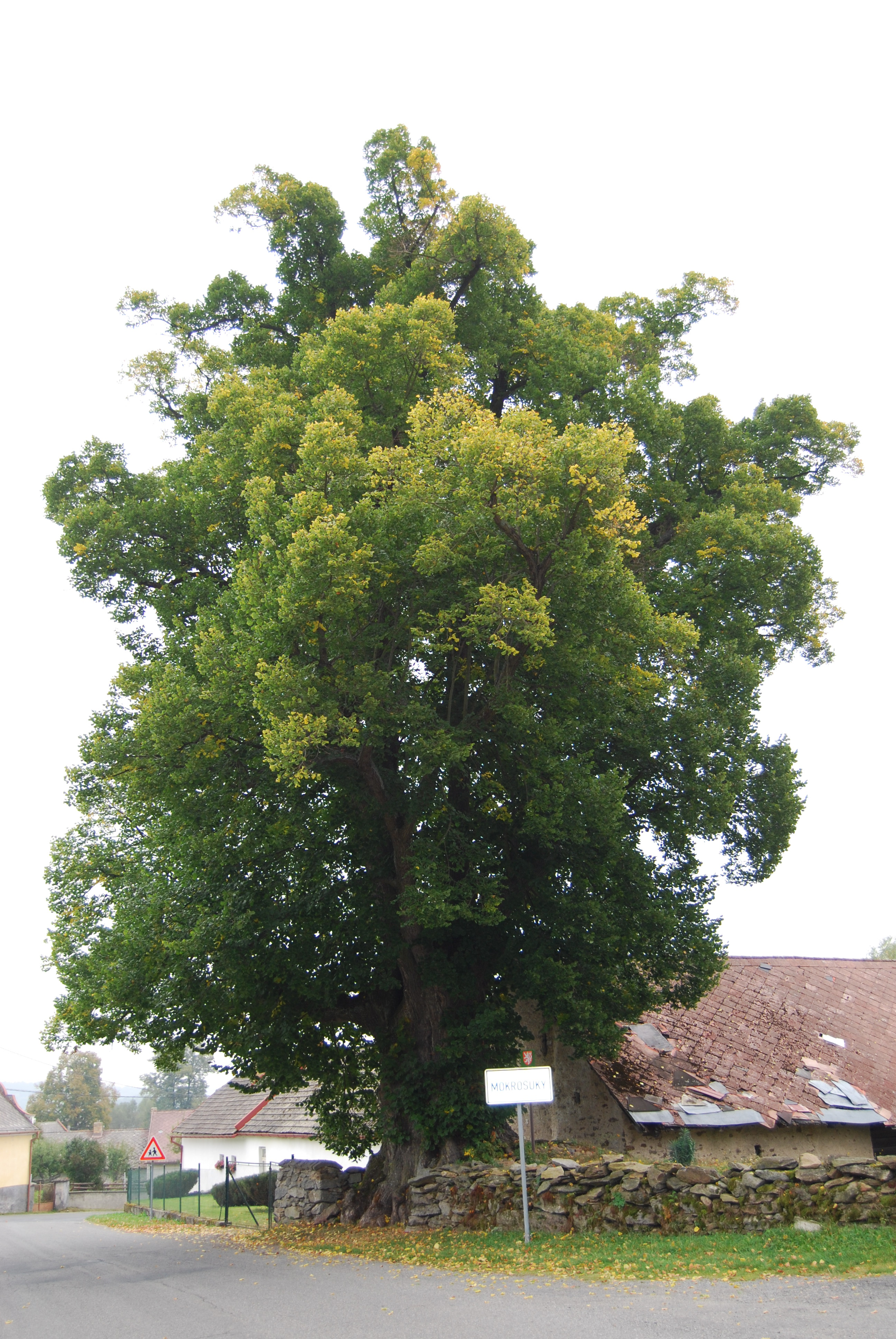 Lípa u Zelených na kraji obce. Obec Mokrosuky. Okres Klatovy. Kraj Plzeňský. Česko.